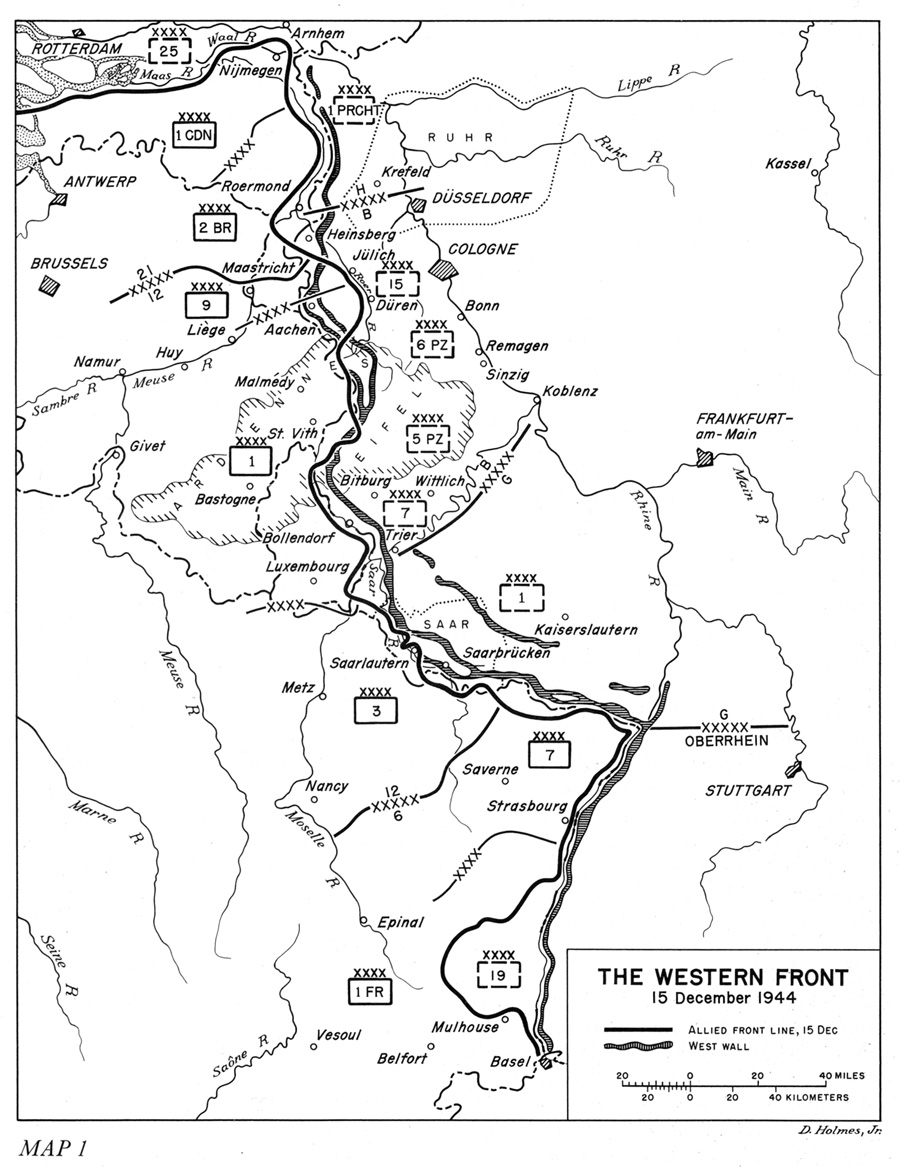 Western Front, Ardennes, 1944